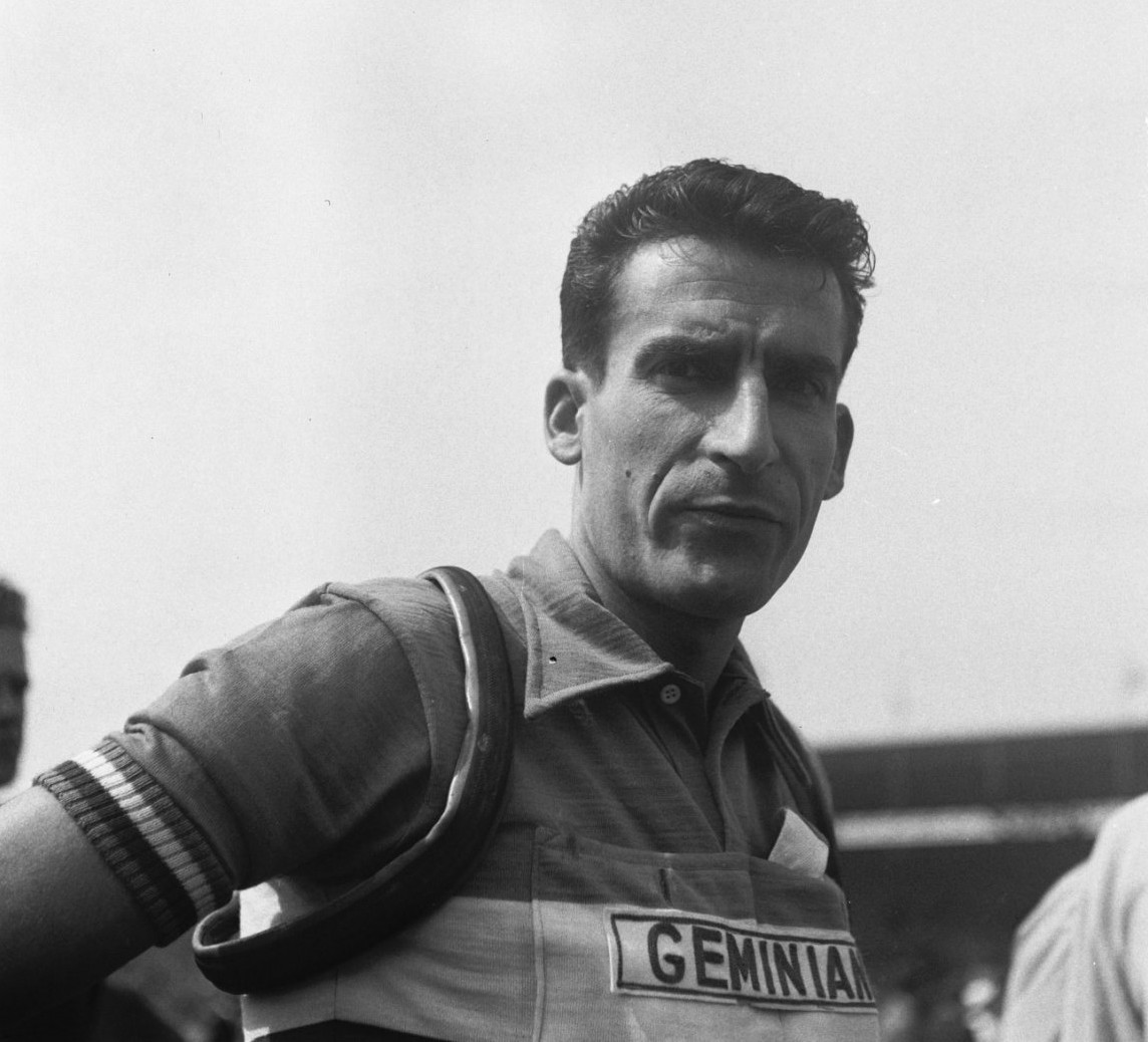 Tour de France. Raphaël Geminiani (Frankrijk)